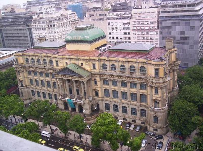 Biblioteca Nacional (Rio de Janeiro, Brasil) - vista aérea.